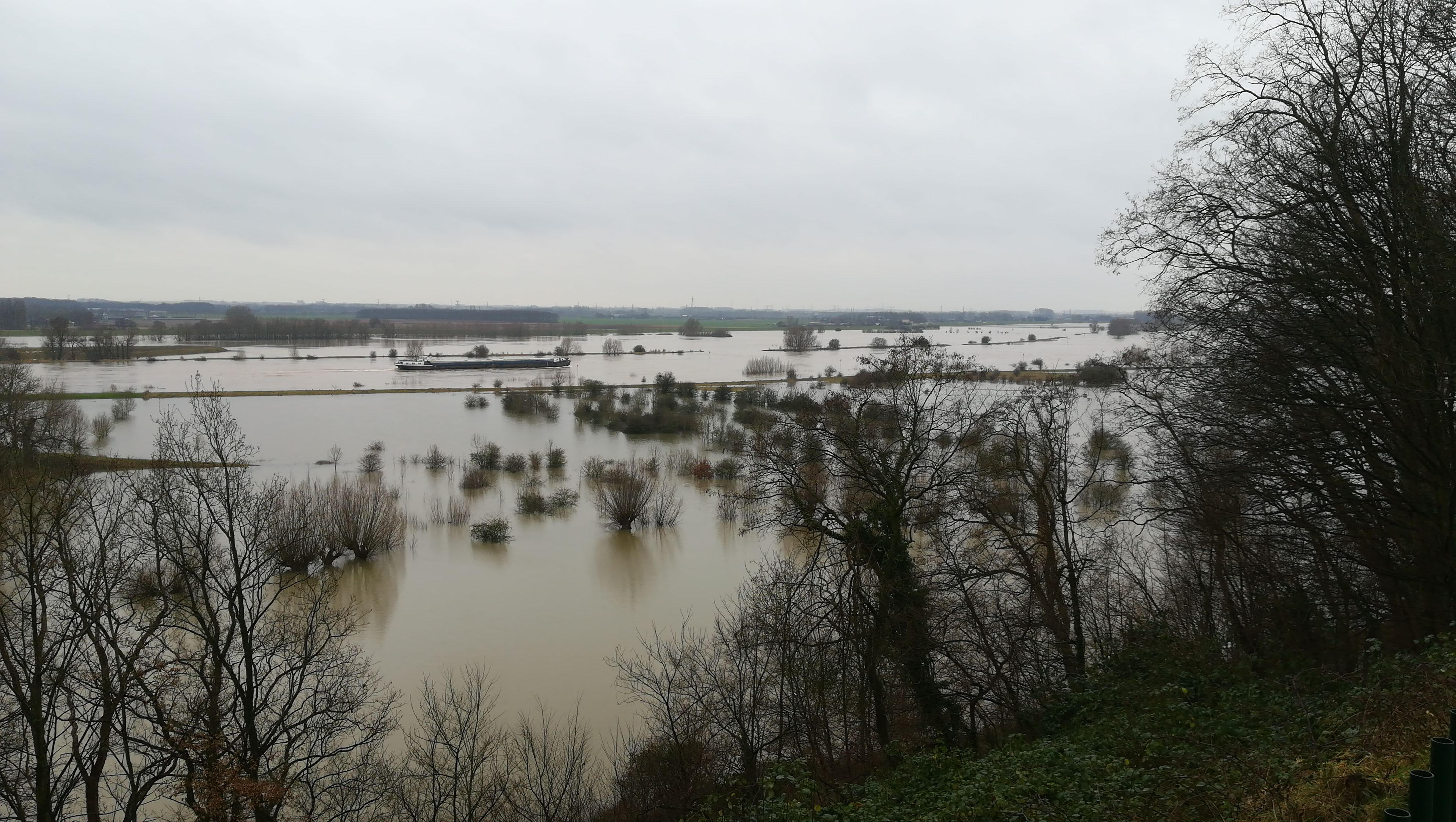 Hoog water in de Nederrijn bij Wageningen. Foto genomen vanaf Arboretum Belmonte. Januari 2018.